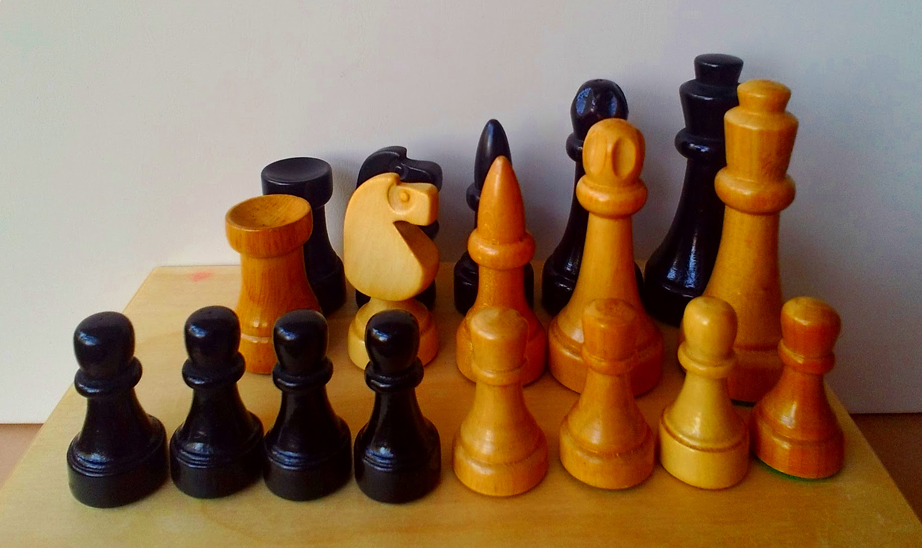 Schachfiguren im Bundesform-Design.